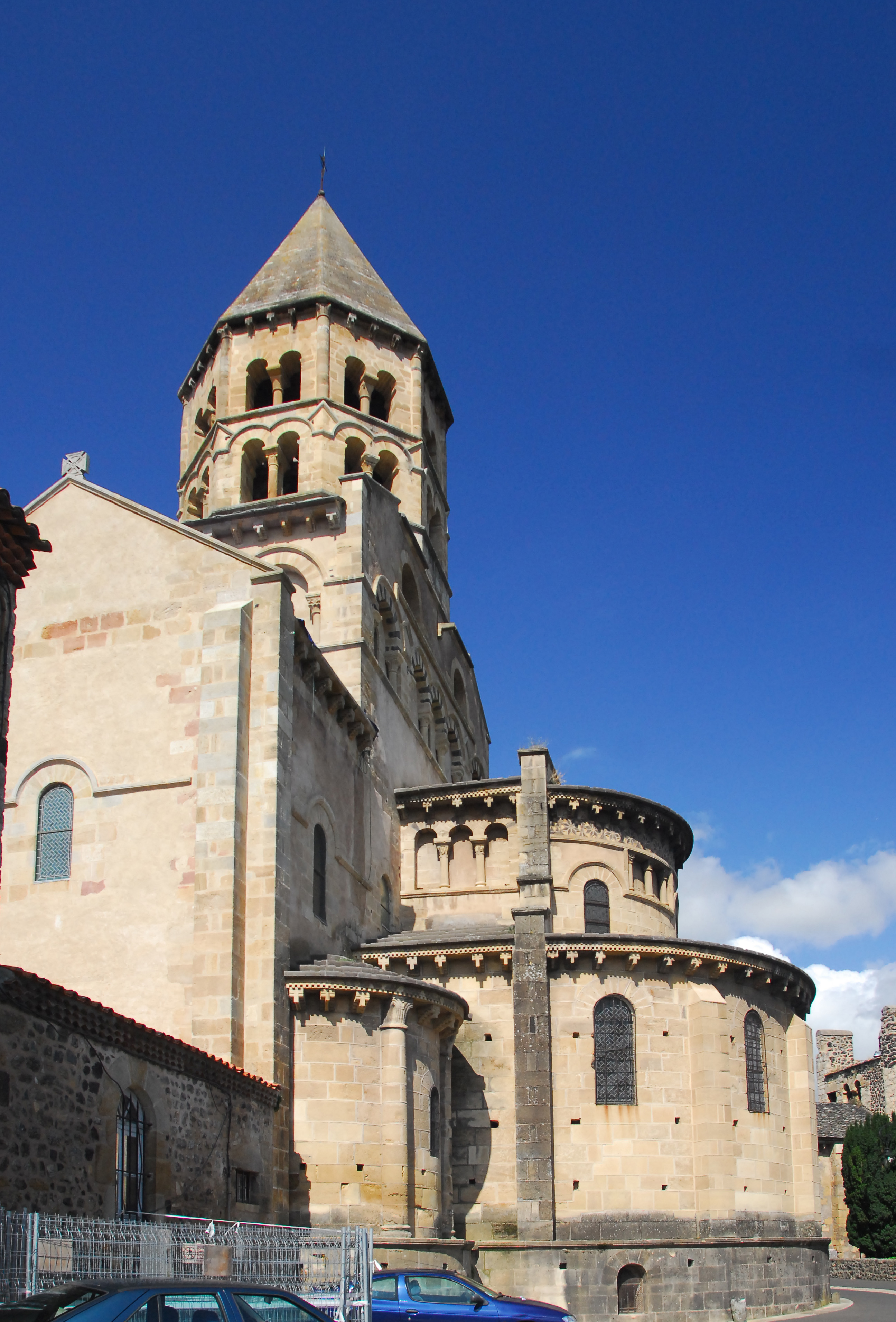 St-Saturnin (Puy-de-Dôme), Chorhaupt von S